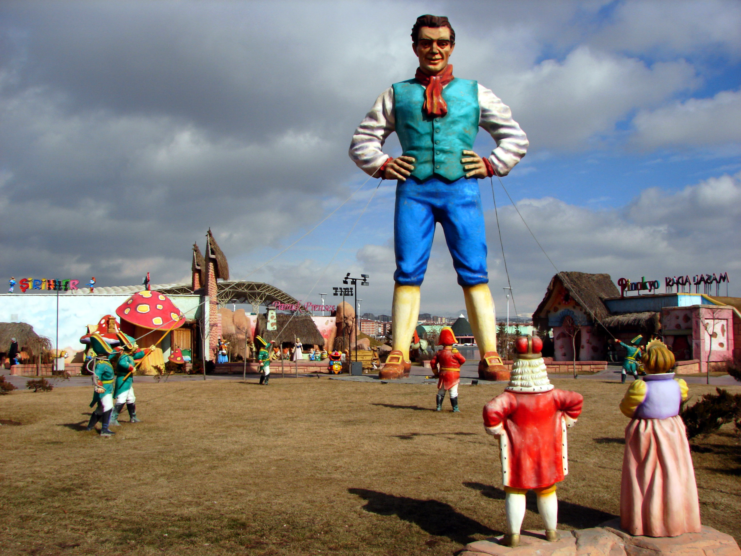 Ankara Amusement Park